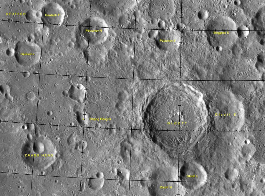 Cráter Chang Heng (LRO)